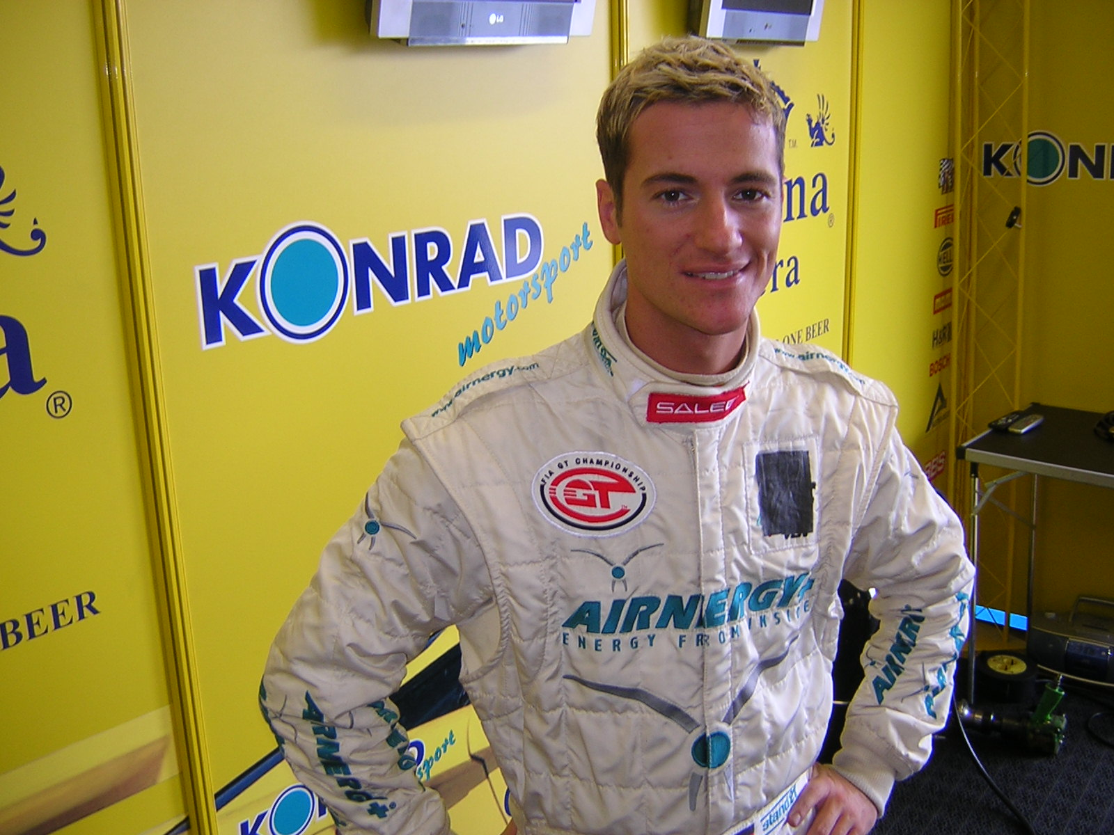 Sebastian Stahl ( Stiefbruder von Michael Schumacher ) am Start zur FIA GT Meisterschaft in Oschersleben im Team von Franz Konrad 2005